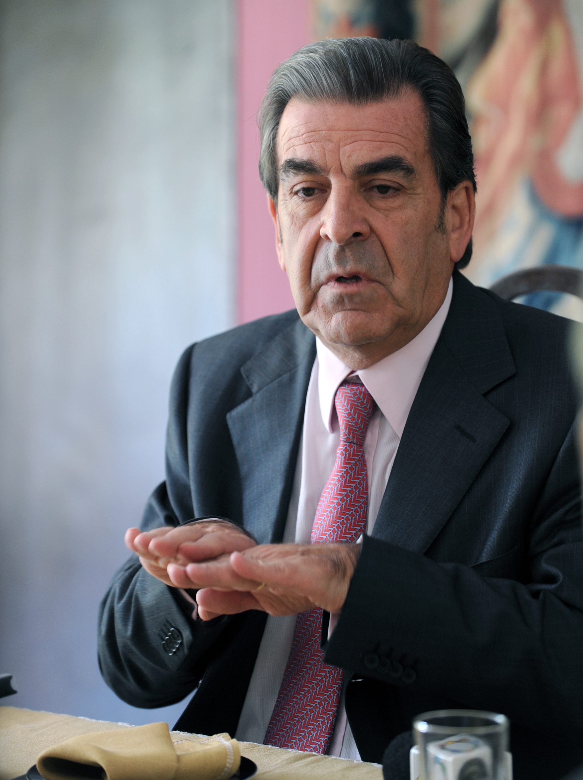 O senador e pré-candidato à presidência do Chile, Eduardo Frei, fala sobre a colaboração energética entre países da América Latina, na embaixada chilena, durante visita ao Brasil.